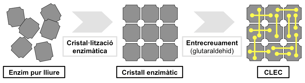 CLEC